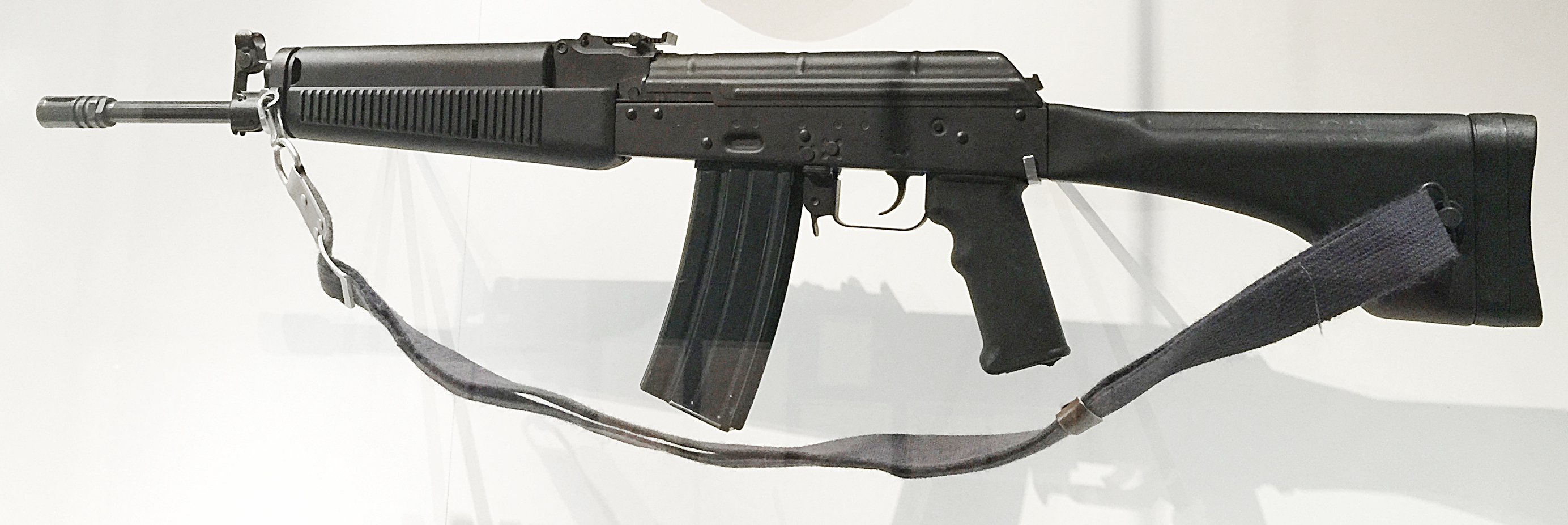 Wieger Maschinenpistole 941 im Militärhistorischem Museum der Bundeswehr in Dresden.